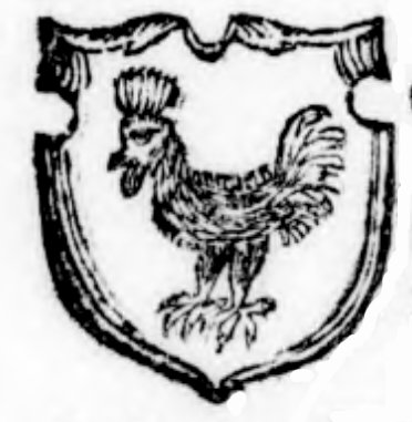 Herb Kur Biały z "Kleynoty abo herby państwa y rycerstwa powiatow y miast głownych Korony Polskiey y W. X. L. według obiecadła dla pamięci łacnieyszey położone" wydanego w 1630 , napisanego przez Gorczyna Jana Aleksandra